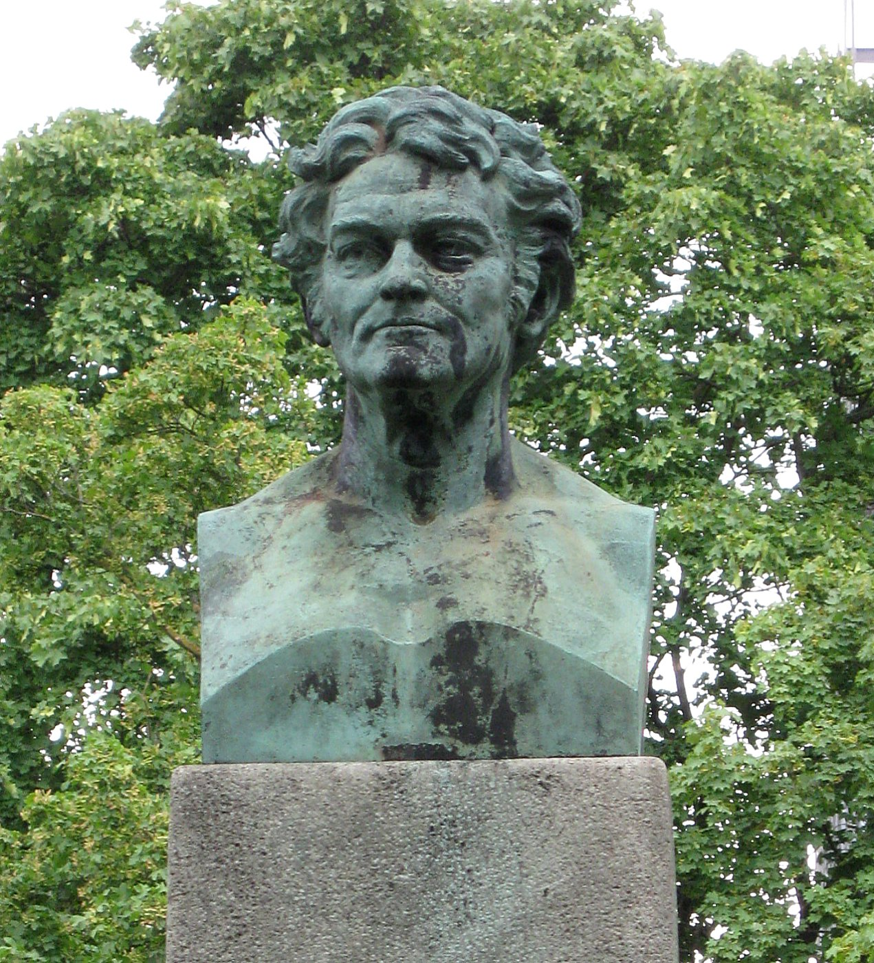 Stelenbüste von Alois Senefelder, Detail, Marsplatz, München